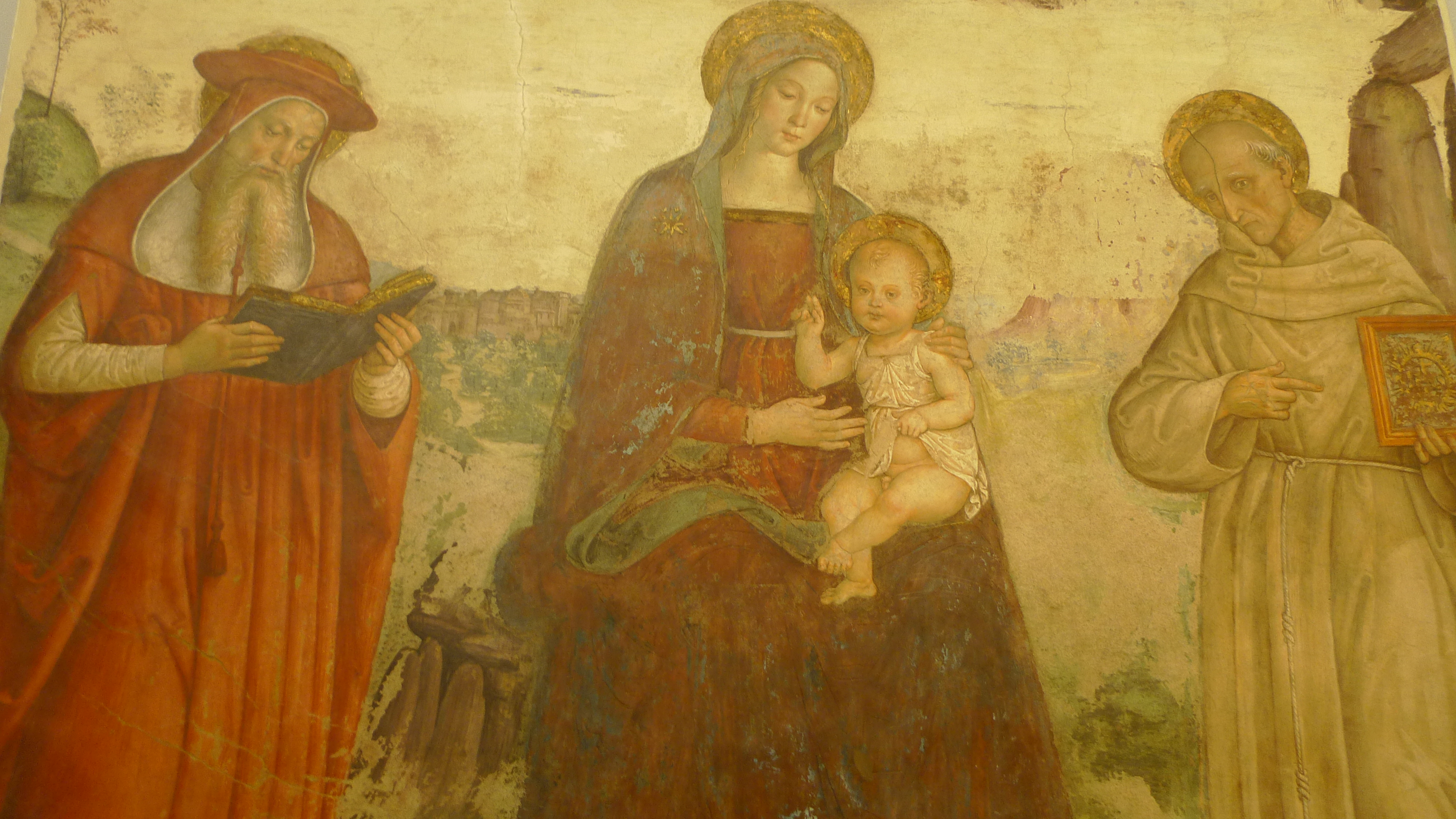 Madonna col Bambino e i Santi Girolamo e Bernardino da Siena